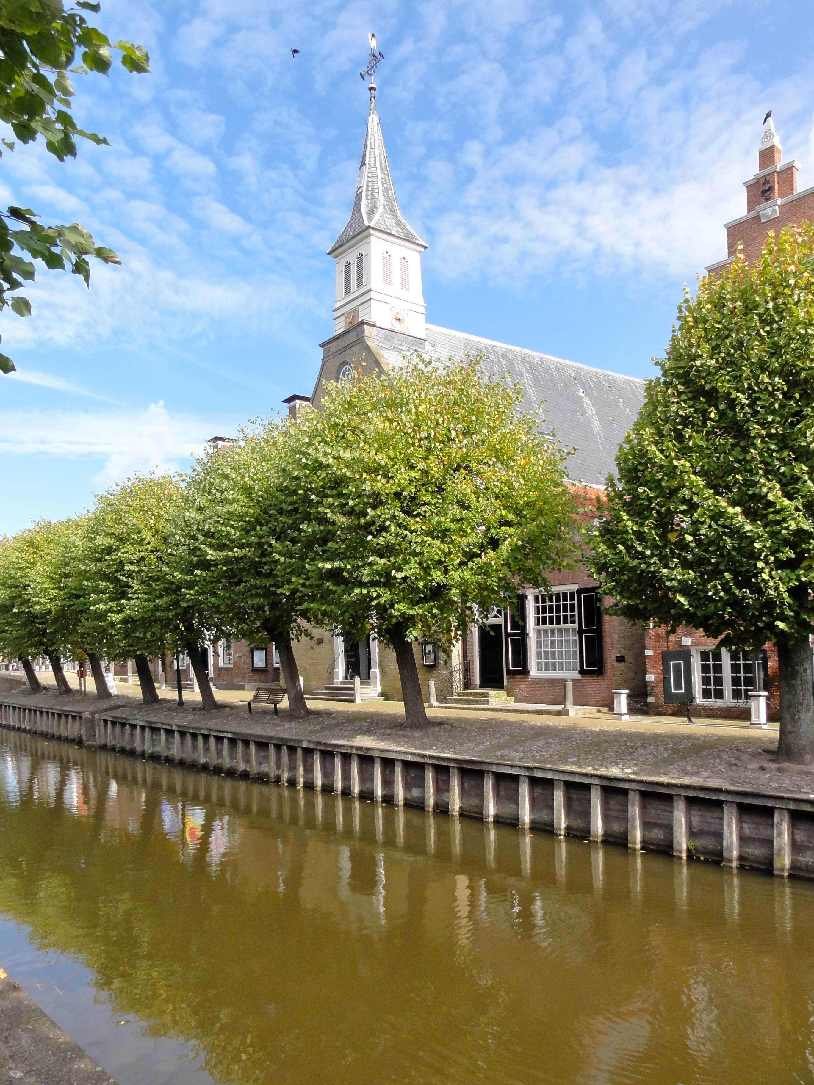 Heerenwal met kerk te Sloten